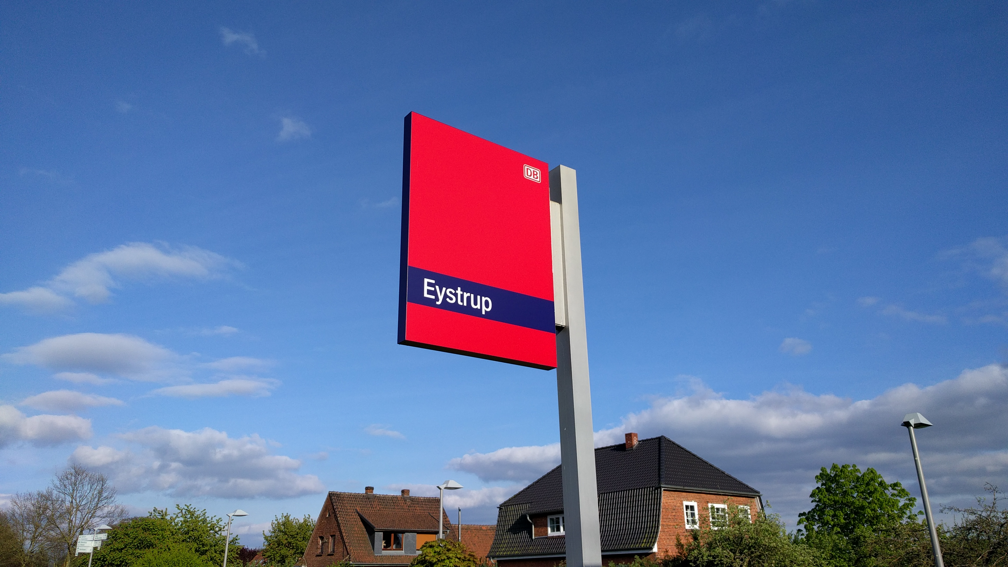 Bahnhofsschild Eystrup